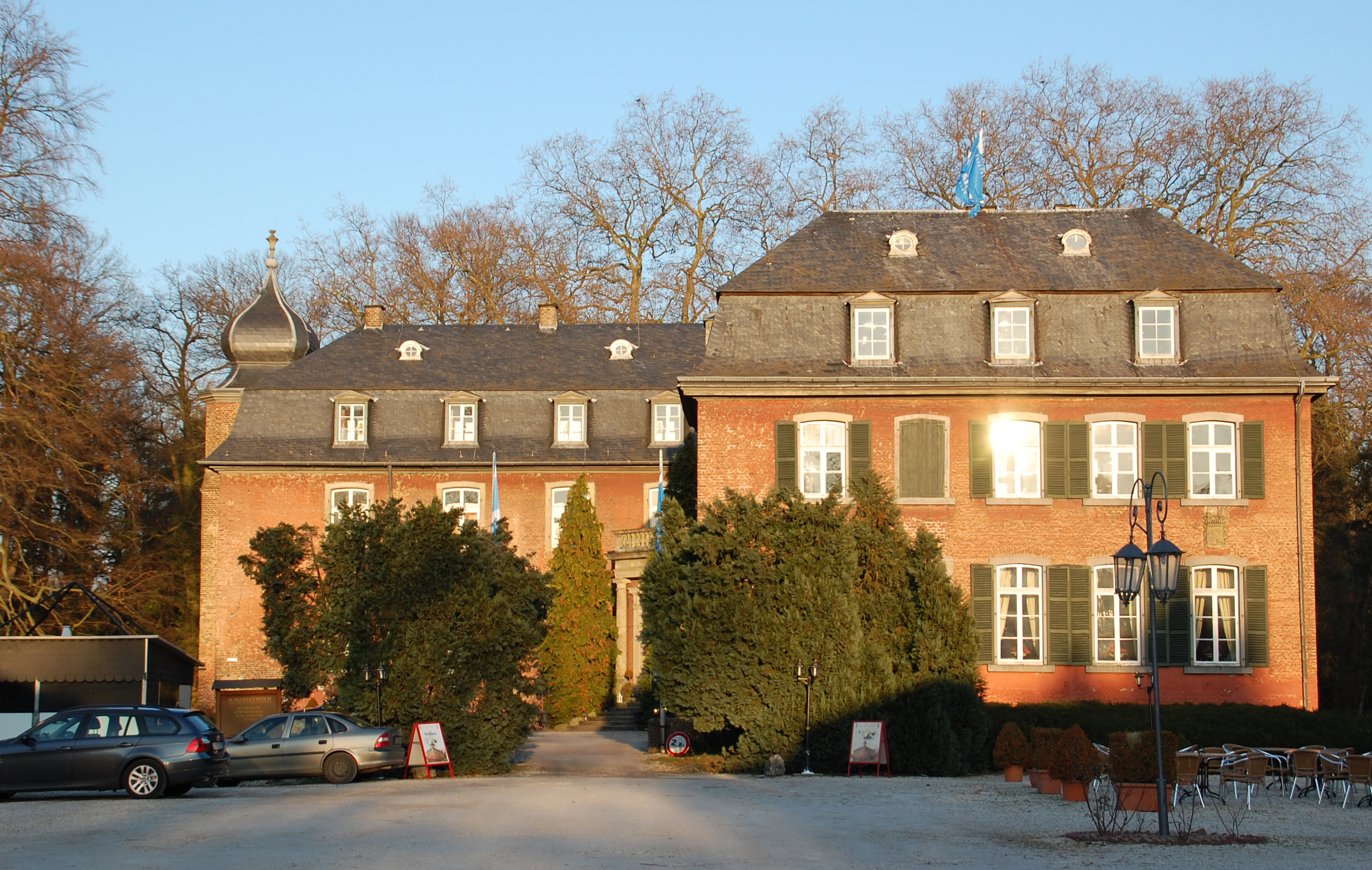 Schloss Gymnich, Erftstadt, Germany